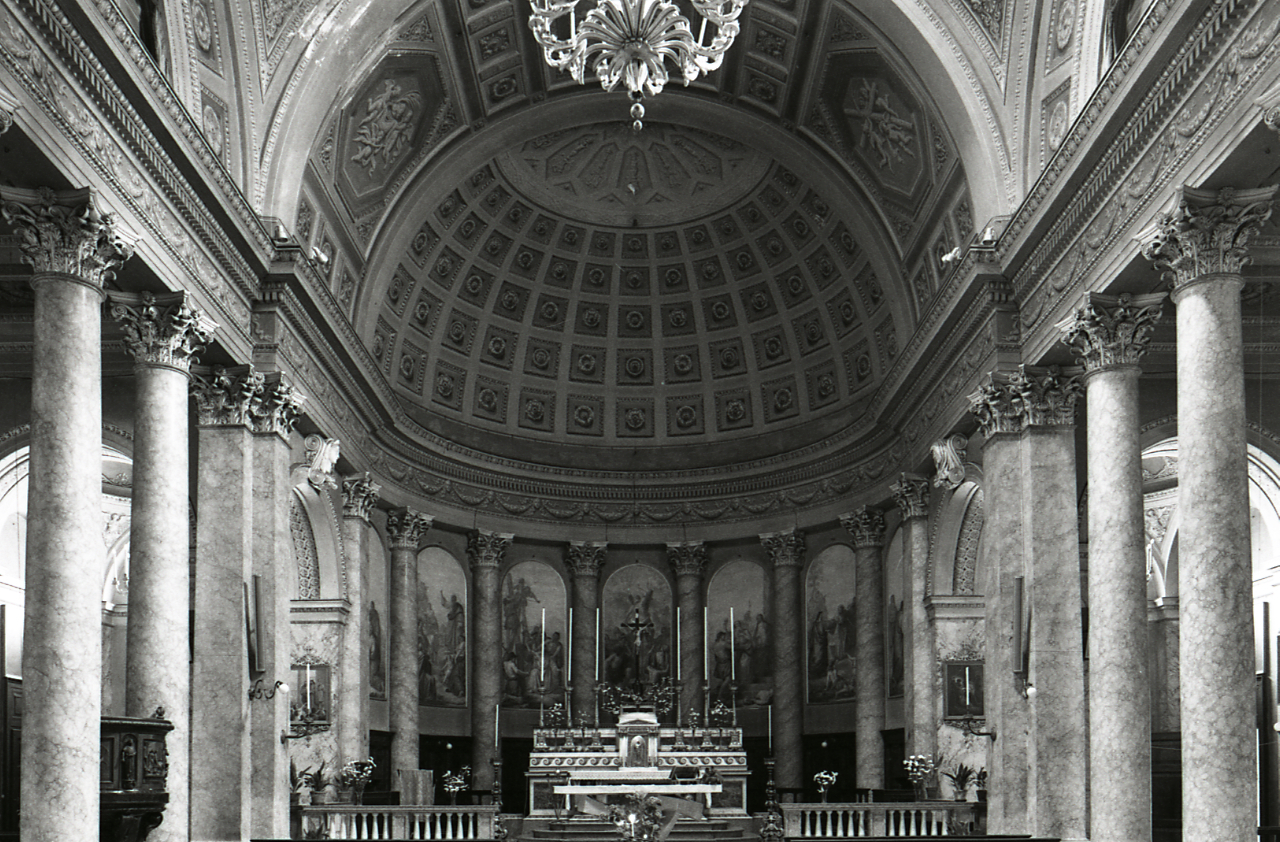 Bergamo. Architetture. Servizio fotografico : Bergamo, 1980 / Paolo Monti. - Strisce: 7, Fotogrammi complessivi: 37 : Negativo b/n, gelatina bromuro d'argento/ pellicola ; 35 mm. - ((Sul portanegativi: N[I]K[MA]T FP4. . - Confronta scheda 3504Lpbn01-37. - Occasione: Documentazione per la pubblicazione: Fumagalli Alberto, "Bergamo: origini e vicende storiche del centro antico", Milano, Rusconi immagini, 1981. - Fonte: Agenda di Paolo Monti: Nikon Leika 3001-/ Monti 1978 (1978-1982), presso Archivio Paolo Monti. - Fonte: Monografia di Fumagalli, Alberto: Bergamo: origini e vicende storiche del centro antico, Milano, Rusconi immagini (1981)